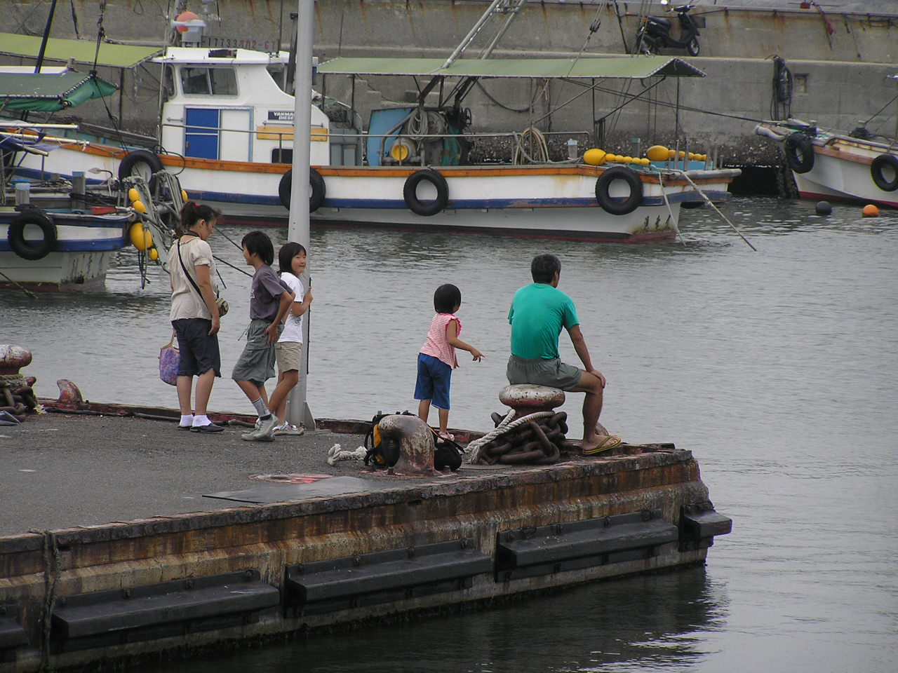 Kashira island in Bizen, Okayama,Japan 岡山県備前市日生町日生,頭島